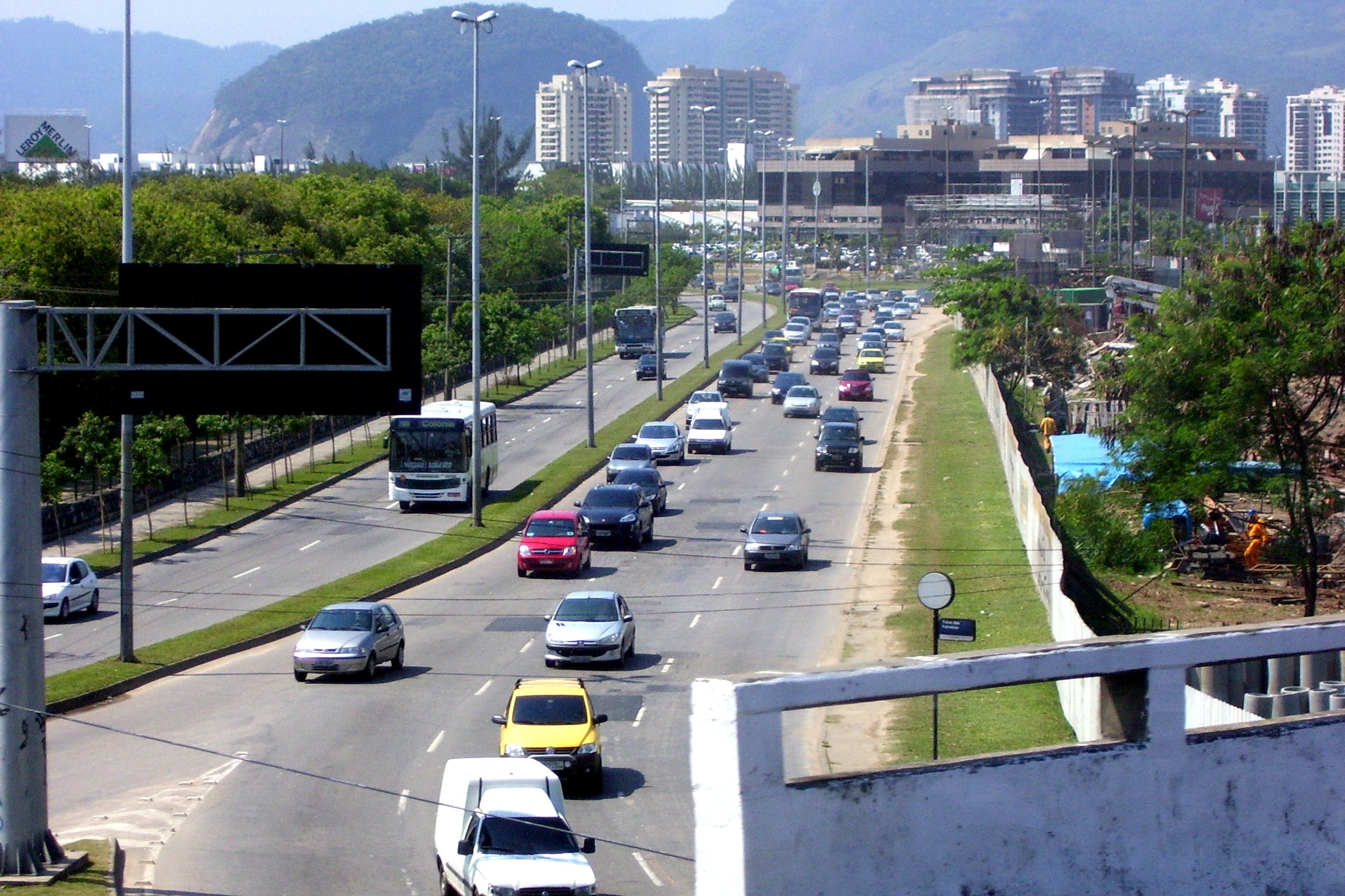 Trevo das Palmeiras, cruzando das avenidas das Américas e Ayrton Senna, na Barra da Tijuca, Rio de Janeiro, Brasil.